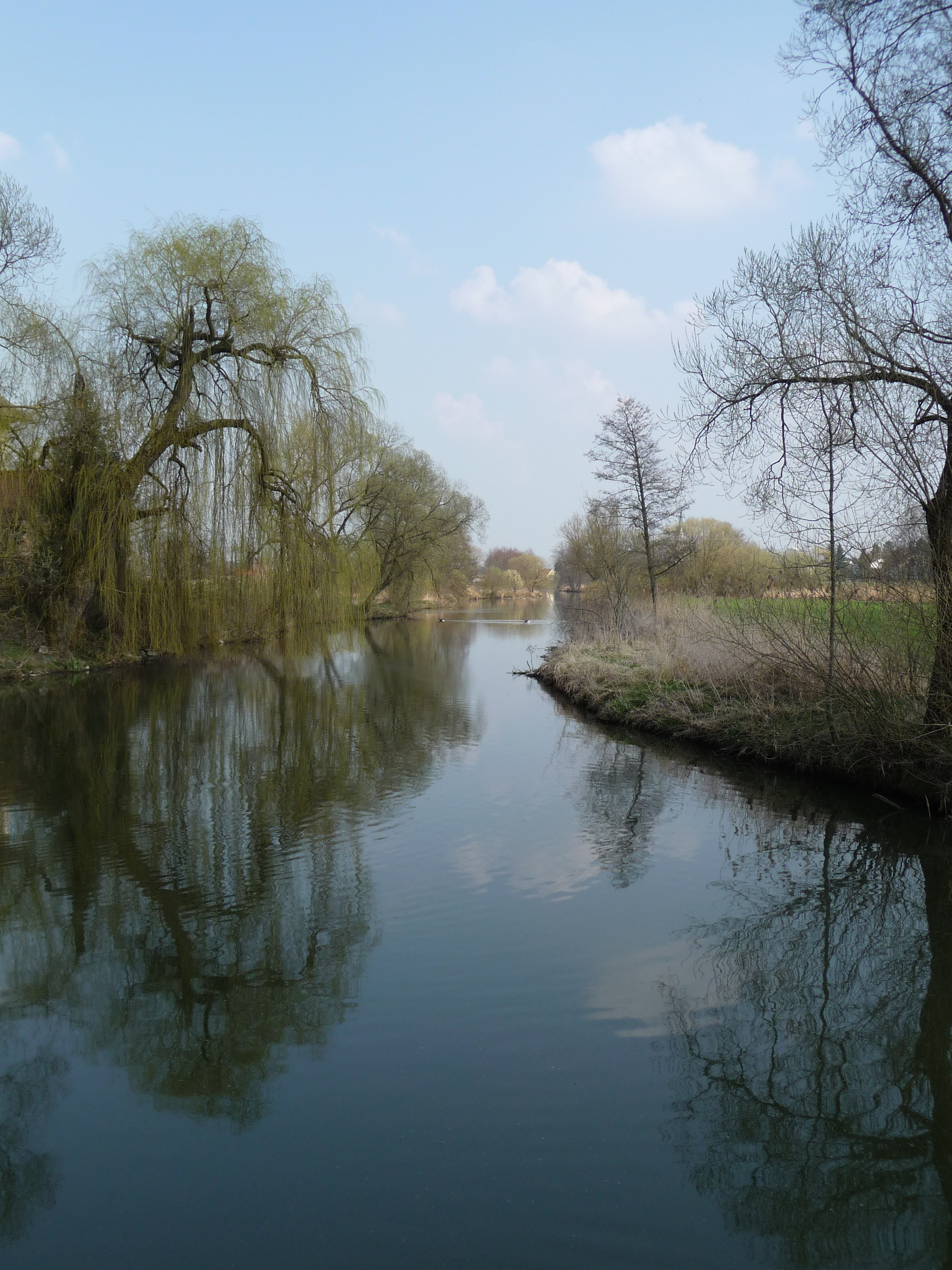 Rott nähe Oberdietfurt